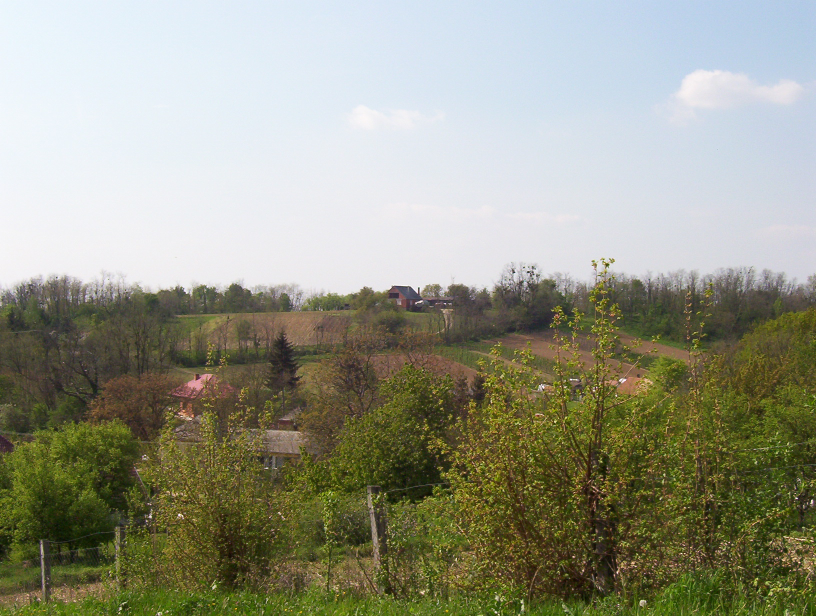 Photo prise par moi-meme en mai 2005 en Hongrie, département du Somogy.